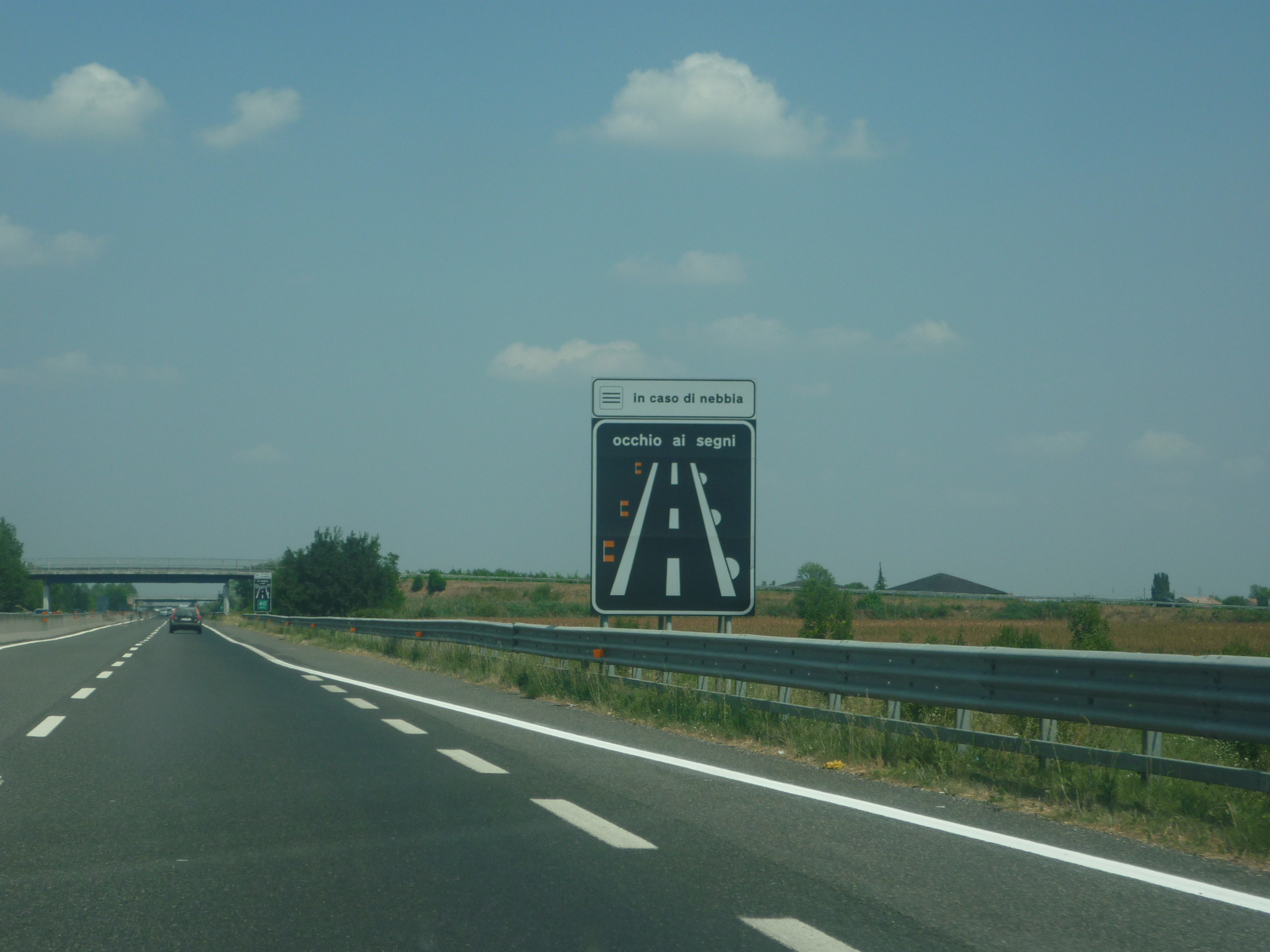 A13